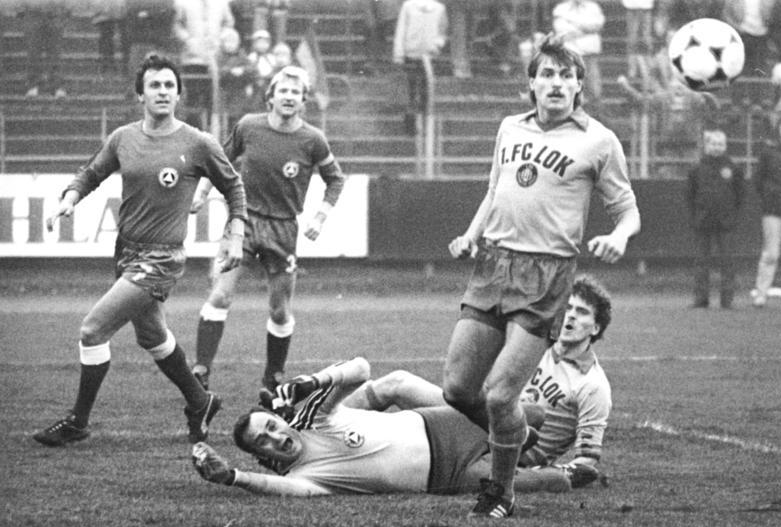 ADN-ZB-Gahlbeck 7-12-86 Leipzig: FDGB-Pokalwettbewerb-Achtelfinalspiel 1. FC Lok Leipzig- BSG KWO-Berlin 3:1- Der Leipziger Hans Richter beim Schuß auf das Tor der Gäste. Am Boden: Tormann Dieter Schönig (KWO). V.l.n.r.: Jury Adshem und Rolf Weber (KWO). Rechts: Olaf Marschall (Lok Leipzig) -am Boden-.